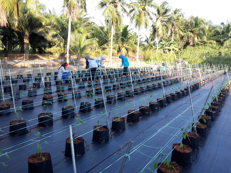 Projek Fortigasi Cili Kg Melayu Niyor Kluang